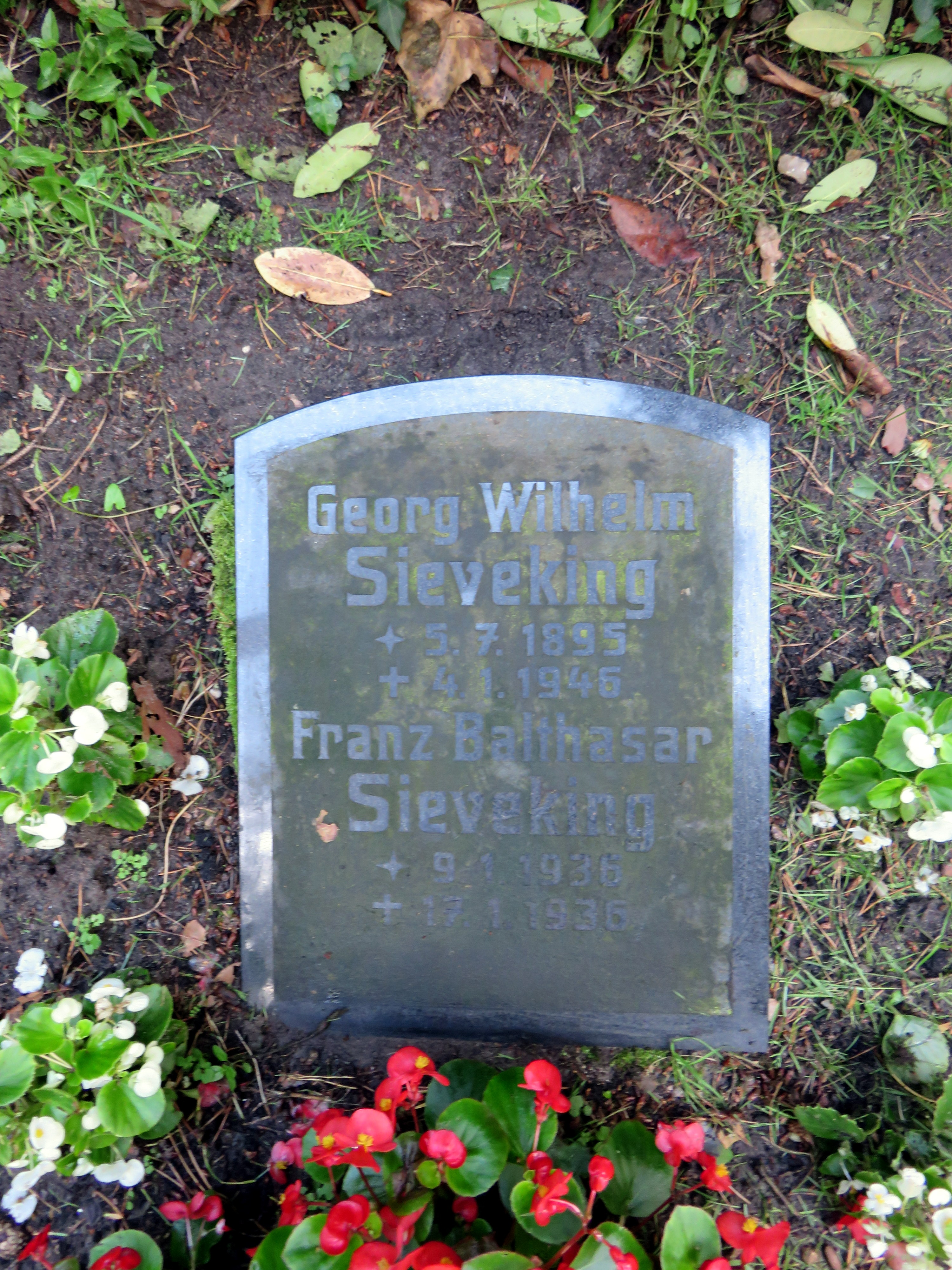 Grabkissen für den deutschen Philologen Georg Wilhelm Sieveking in der Sieveking-Familien-Grabanlage auf dem Hamburger Friedhof Ohlsdorf, Planquadrat S 25 / S 26.